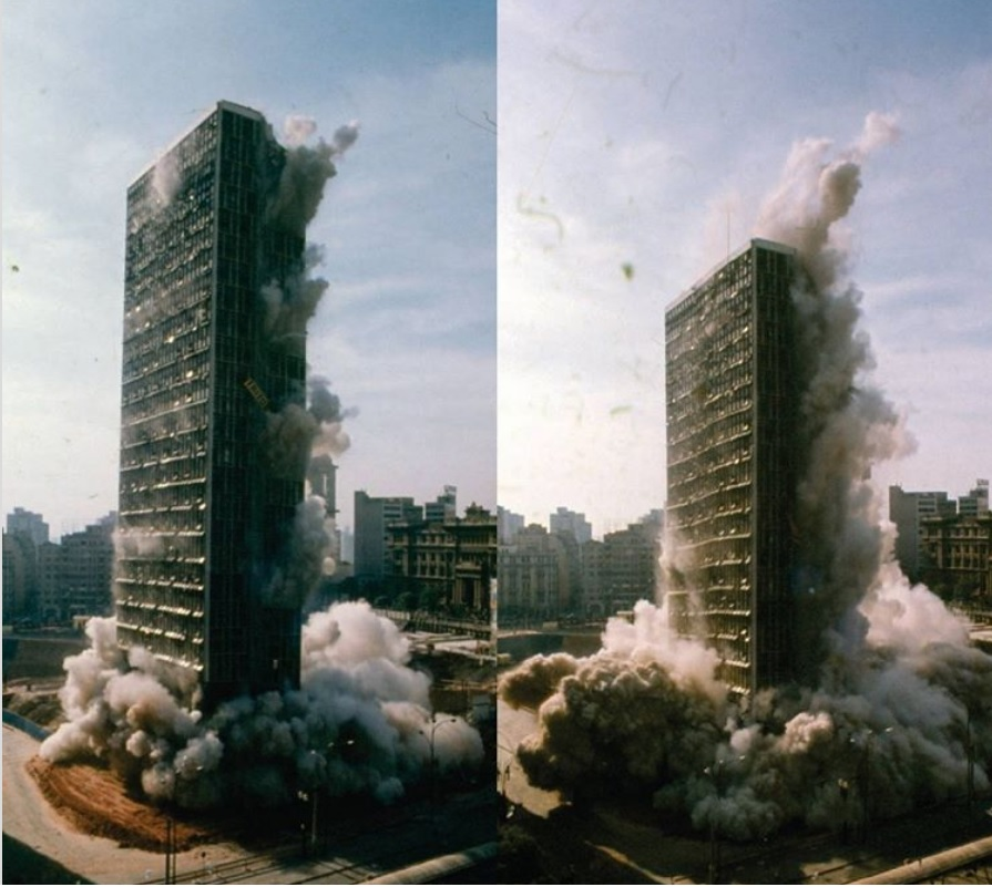 Fotos da implosão do Edifício Mendes Caldeira, realizado pela empresa Controlled Demolition, Inc. Essa foi a primeira implosão de edifício ocorrida no Brasil